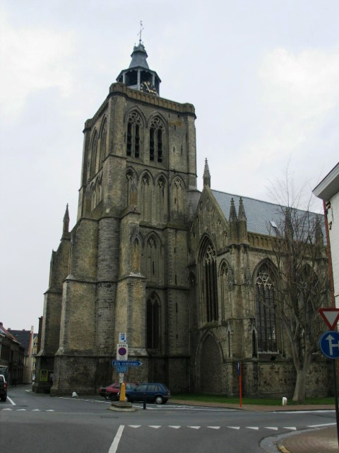 Sint-Bertinuskerk te Poperinge